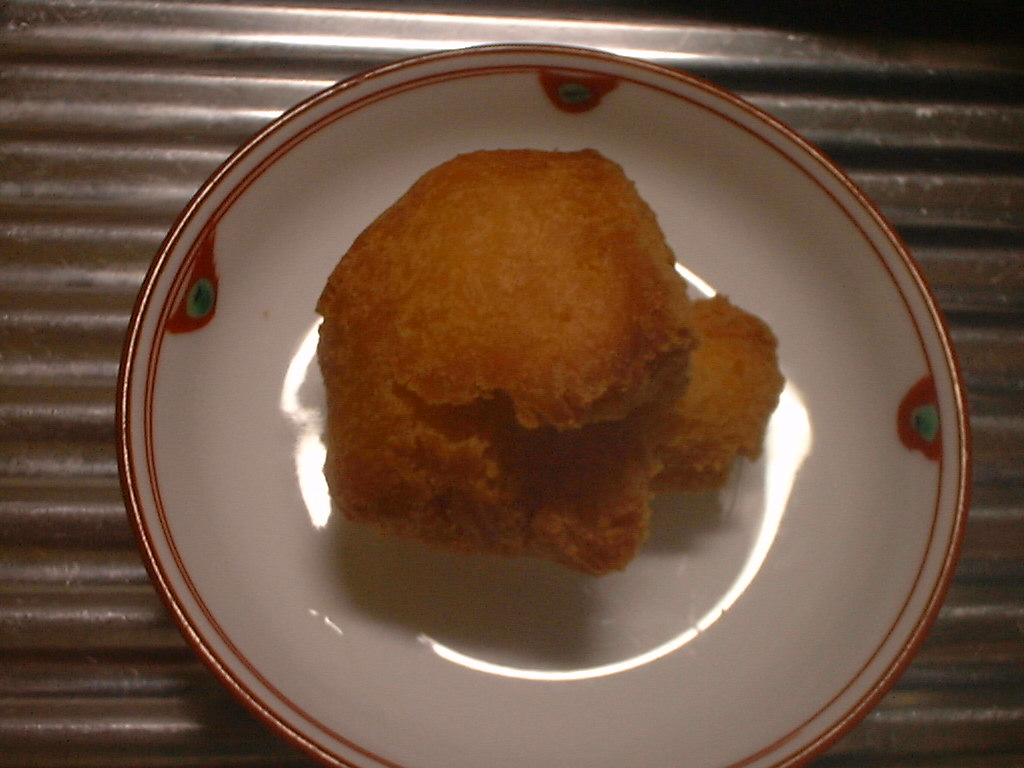 "Sata andagi" is Okinawa doughnuts.サーターアンダーギー